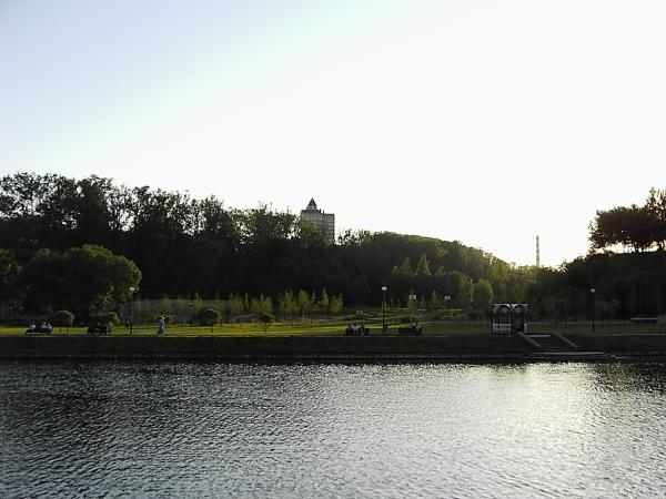 Река Дубровенка